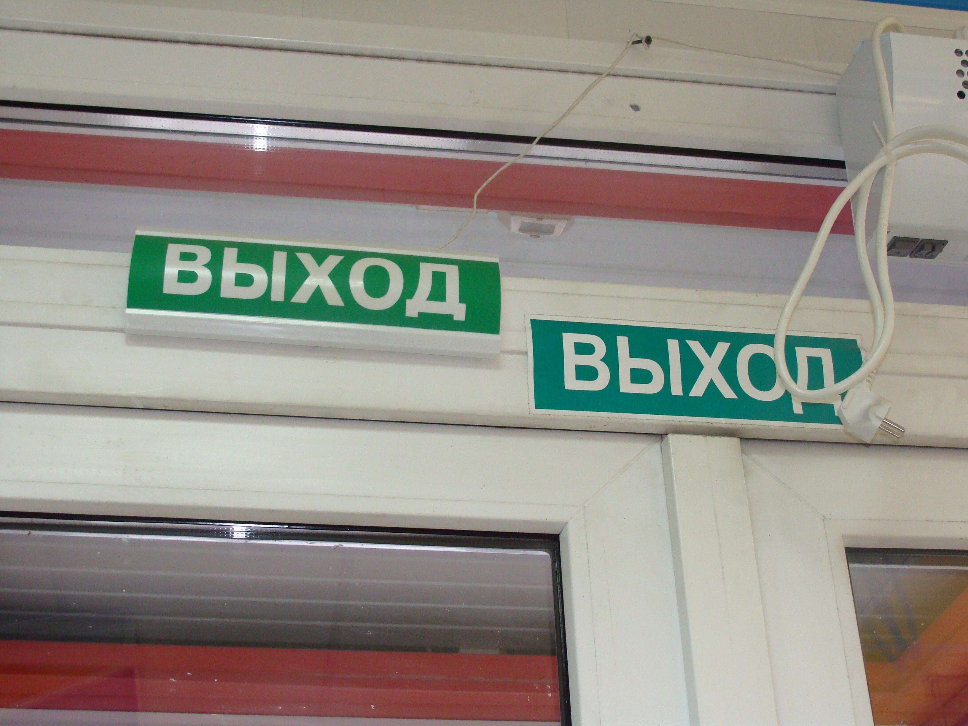 Эвакуационный знак пожарной безопасности "Выход"